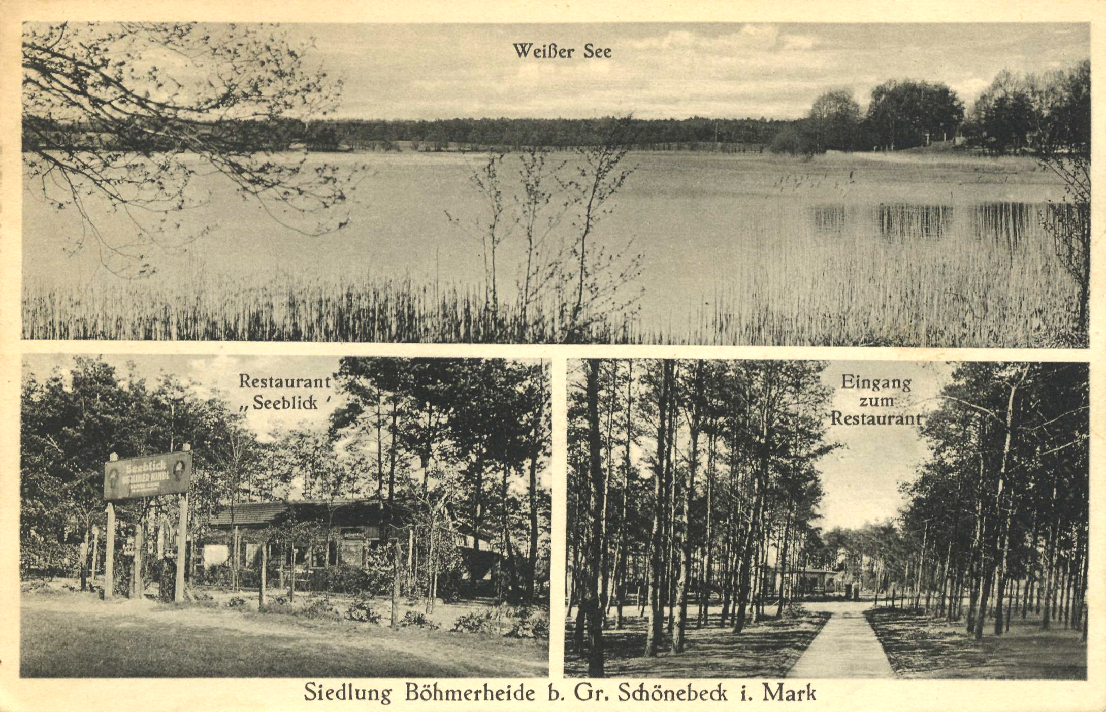 Ansichtskarte zur Siedlung Böhmerheide (heute Gemeinde Schorfheide)